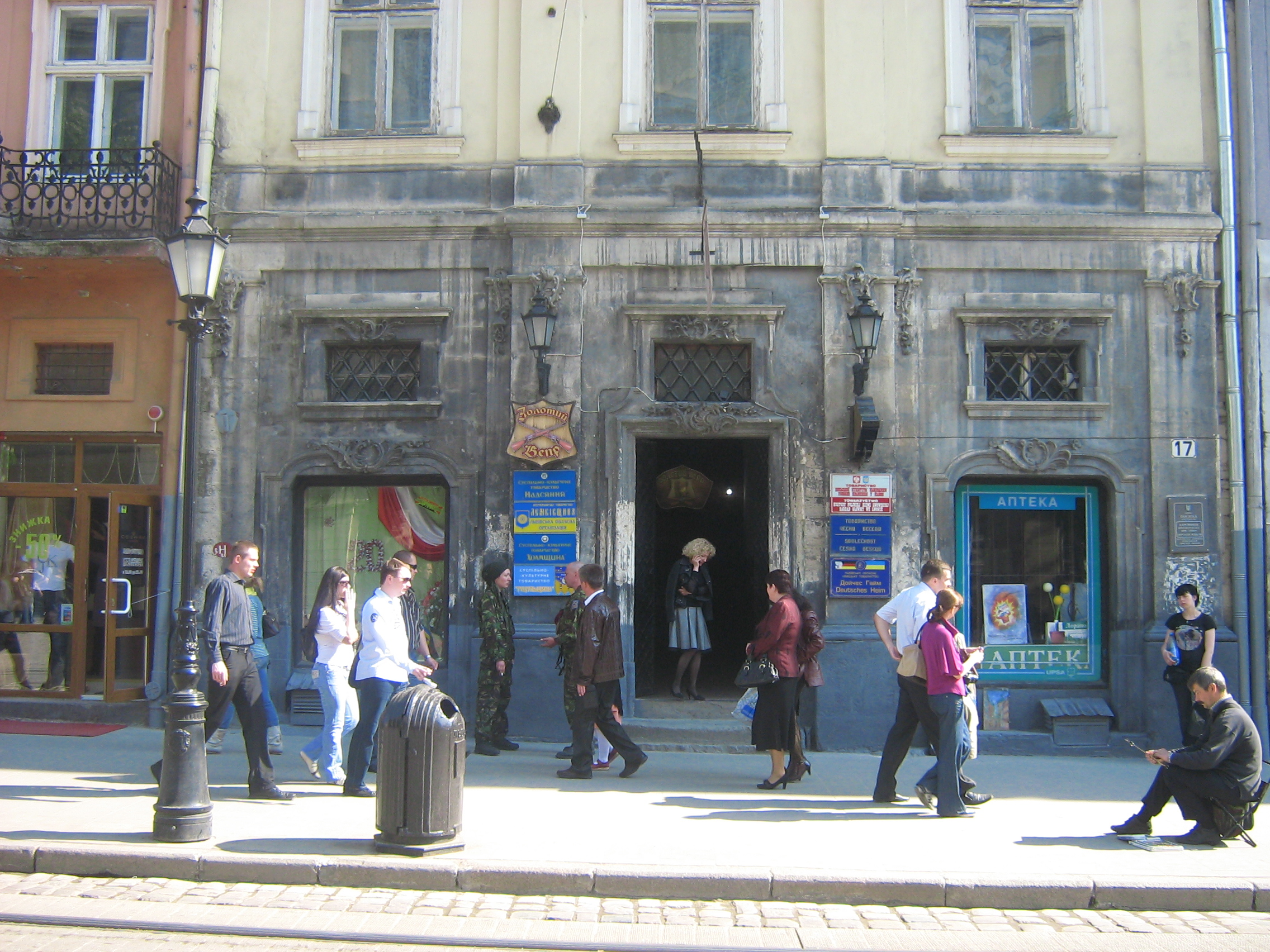 Towarzystwo Kultury Polskiej Ziemi Lwowskiej - siedziba